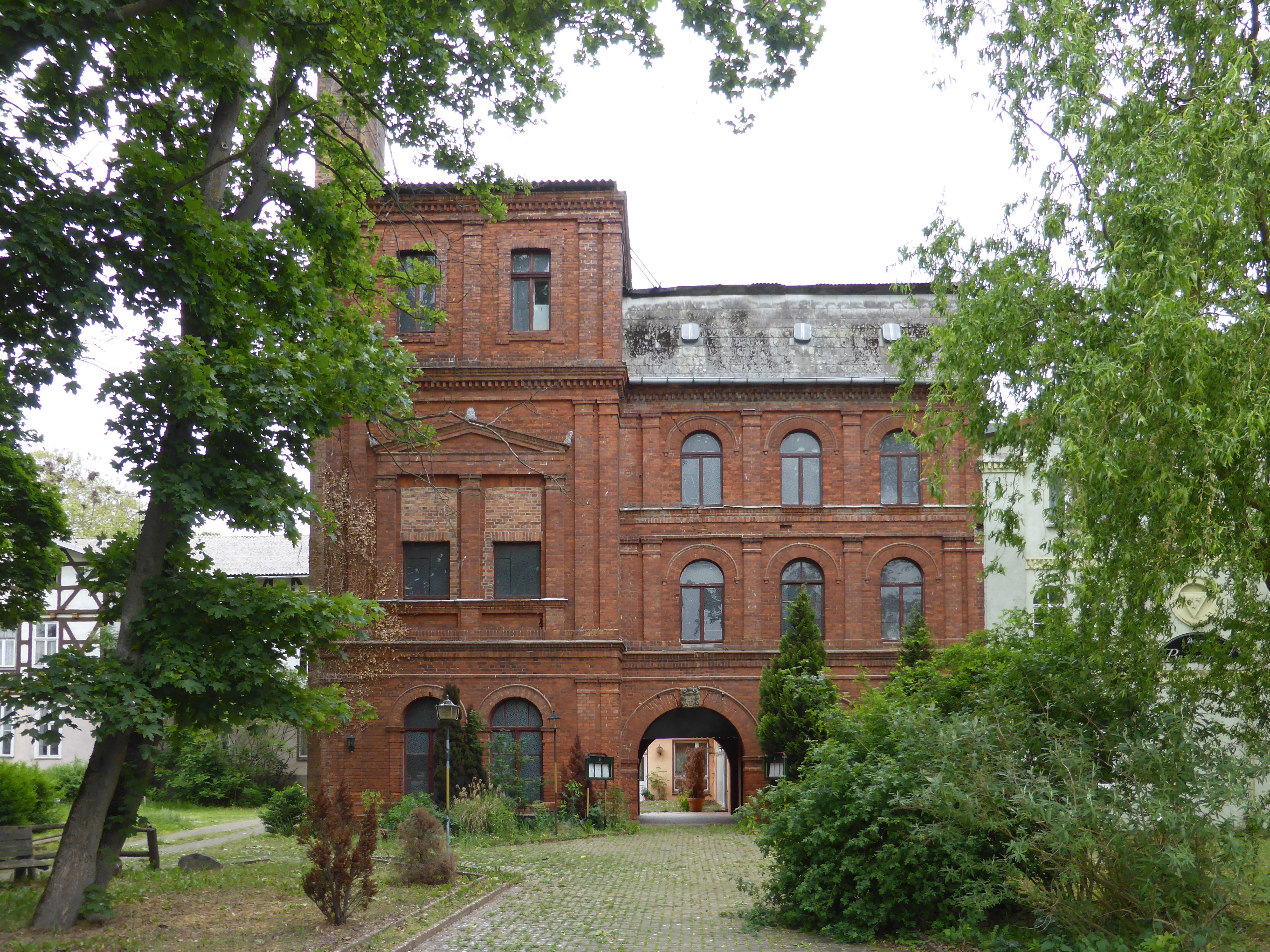 Schloss der Grafen von der Schulenburg in Beetzendorf, Teilansicht.